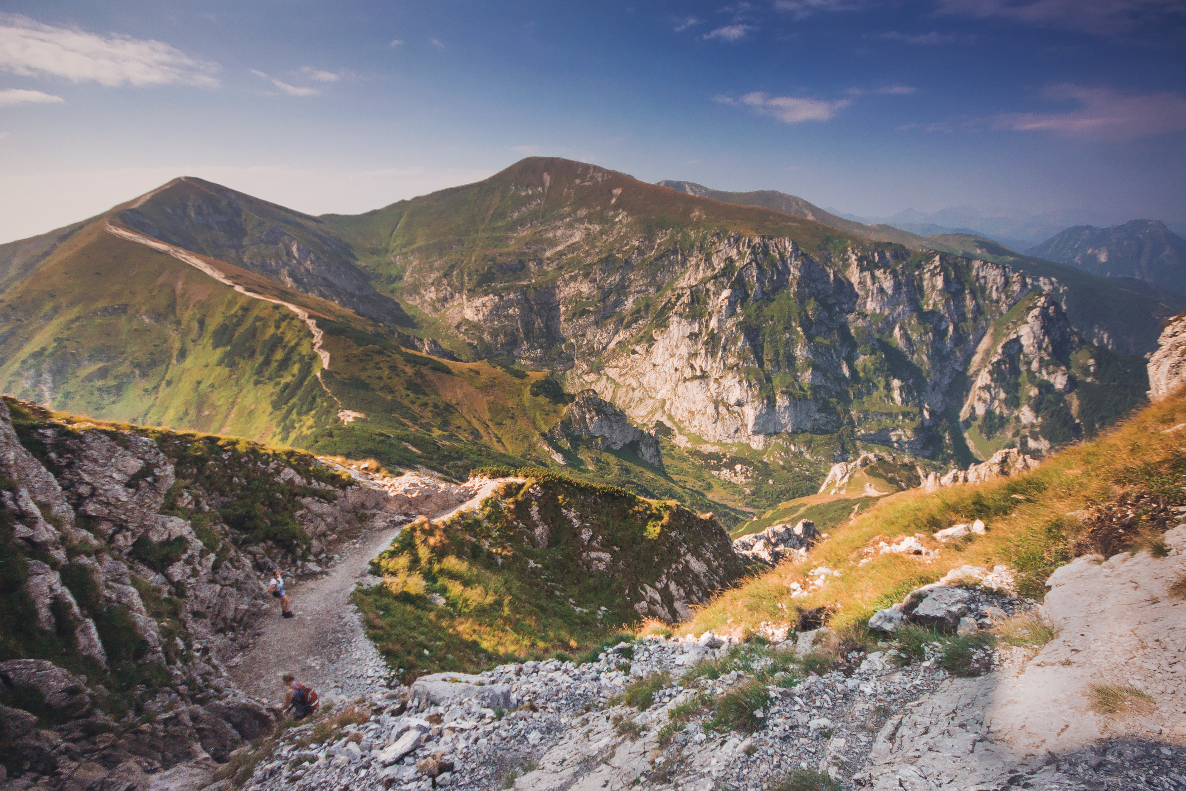 Park narodowy: Tatrzański Park Narodowy This is a photography of protected area with CRFOP ID PL.ZIPOP.1393.PN.14